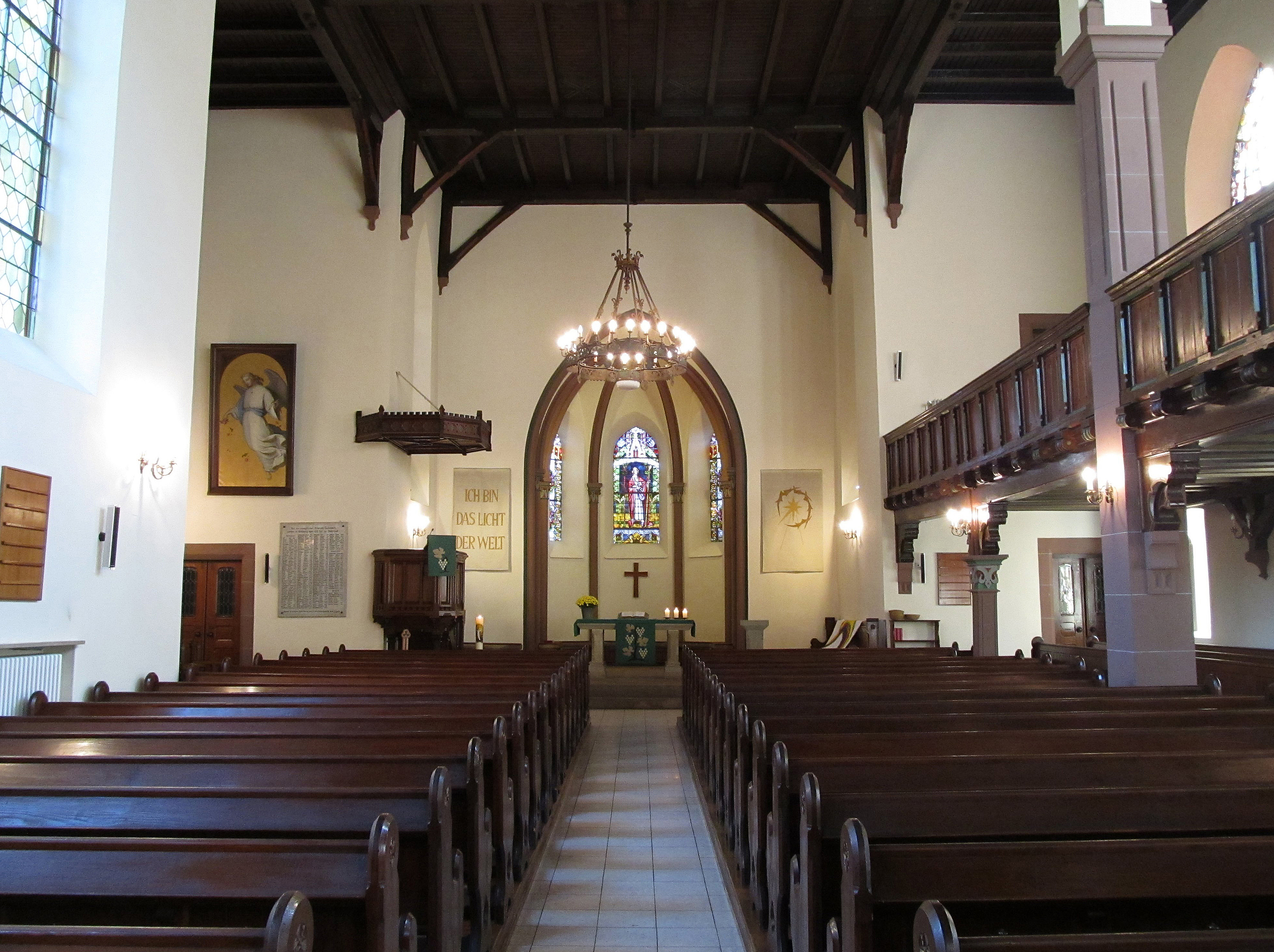 Blick ins Innere der Evangelischen Kirche in Sulzbach, Saarland